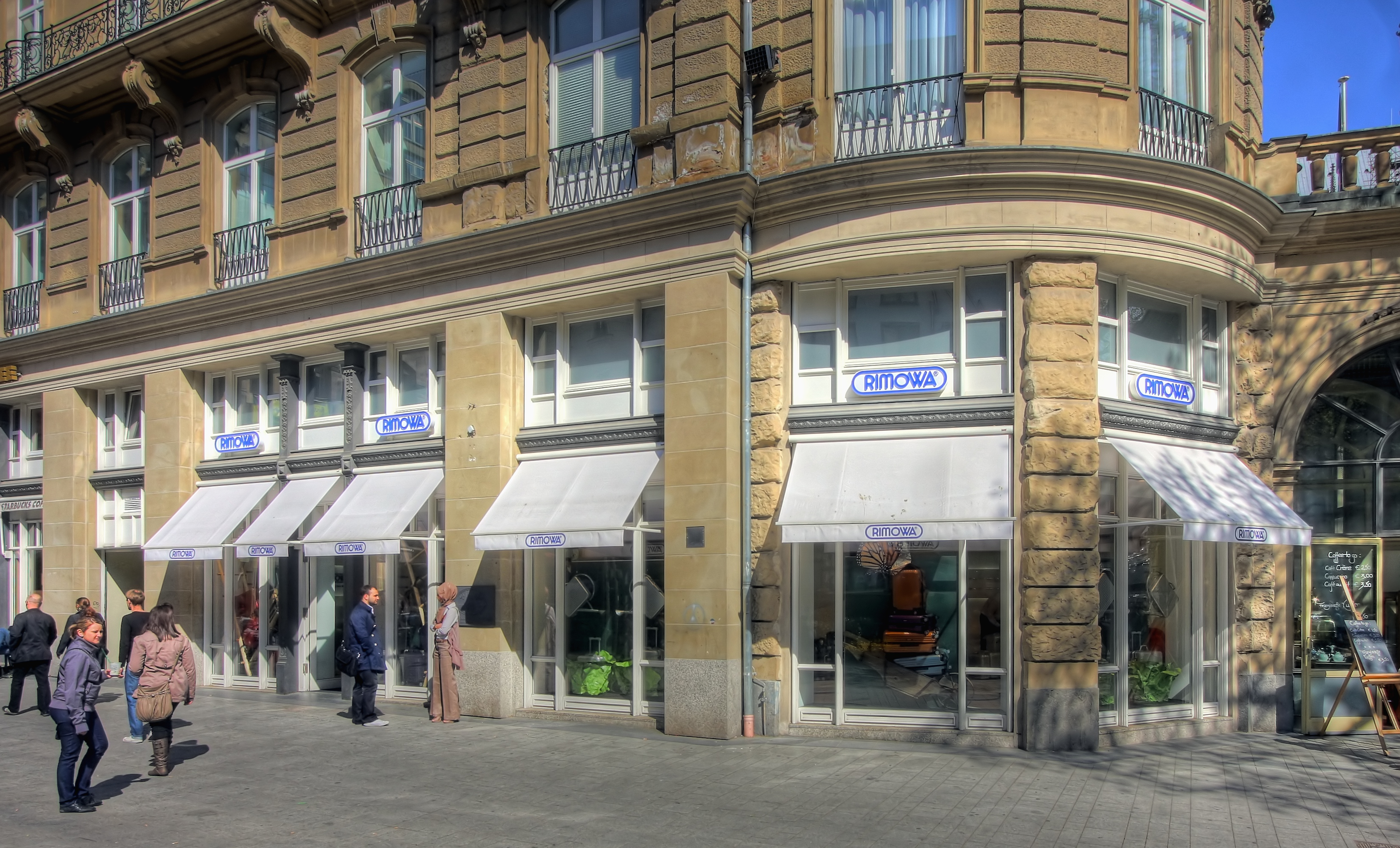 Flagshipstore des Kofferherstellers Rimowa in Köln, Am Hof